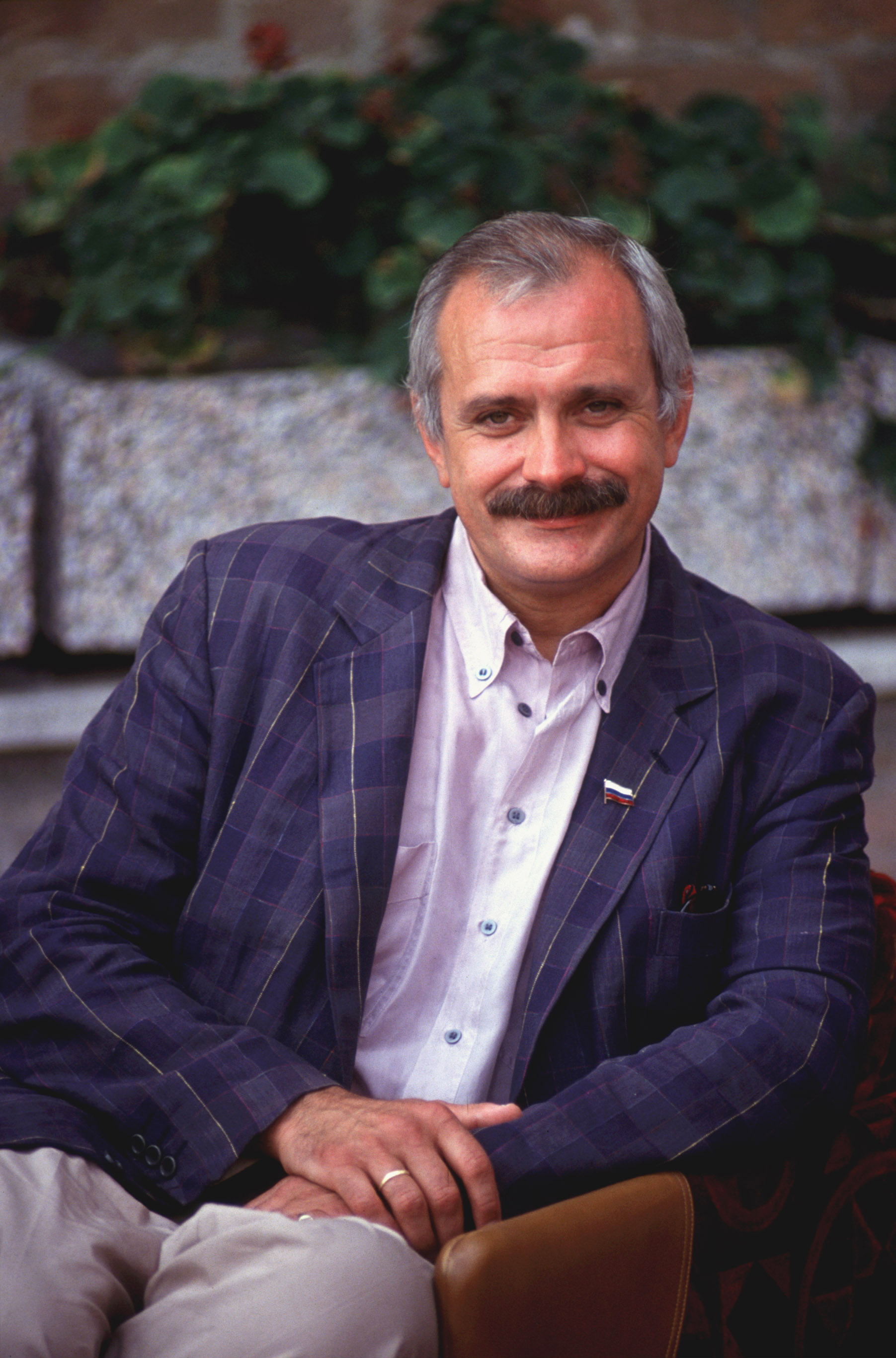 Il regista russo Nikita Michalkov alla Mostra del cinema di Venezia del 1987